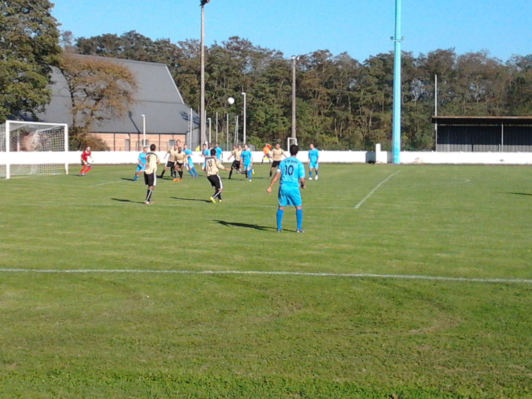 Photo du match Stade Hénin/Calonne Liévin (1-3), match de Division Honneur (huitième division française)